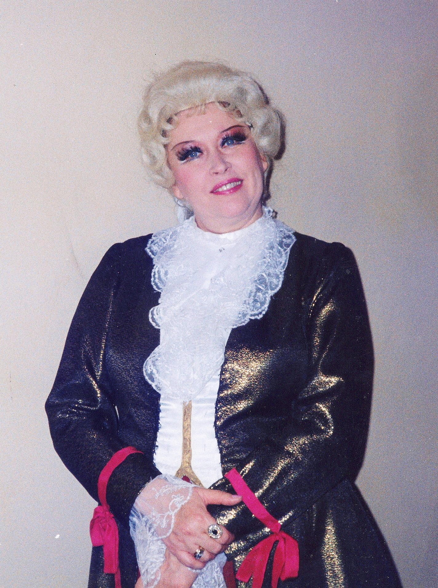 Пиковая дама